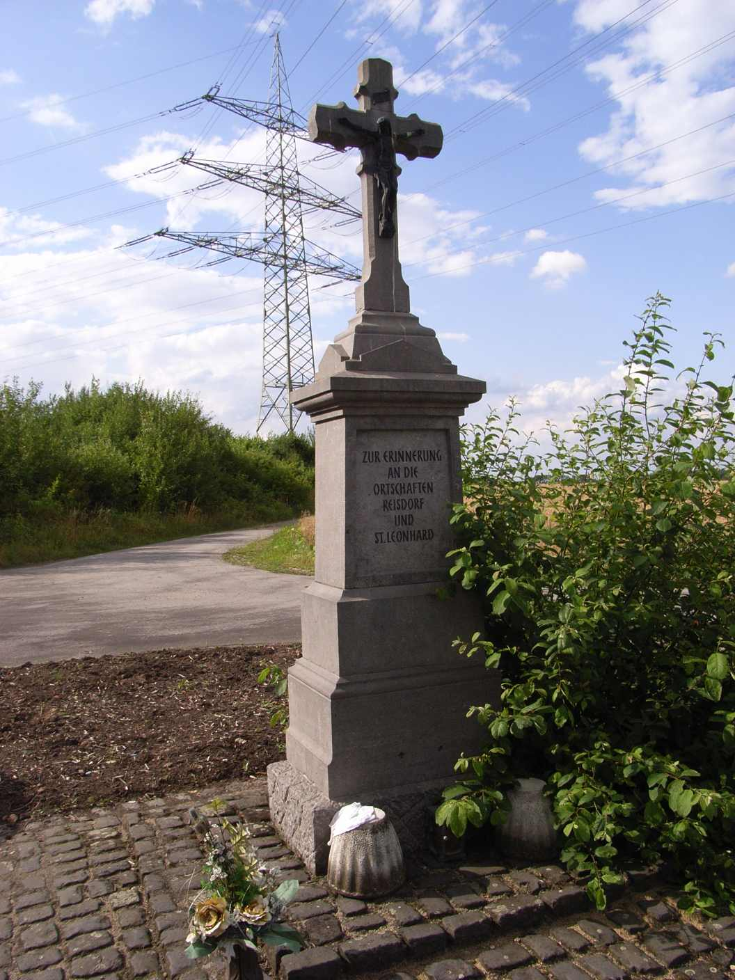 Denkmal für die untergegangene Ortschaft Reisdorf, Gustorfer Höhe bei Grevenbroich, NRW